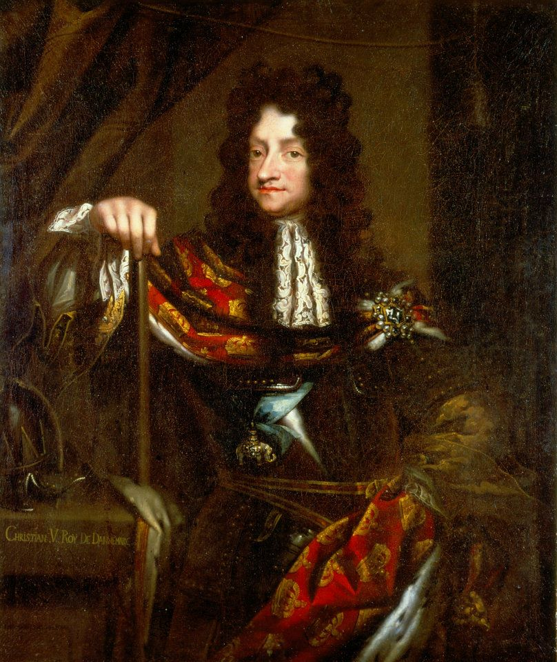 Christian V (1646-1699)